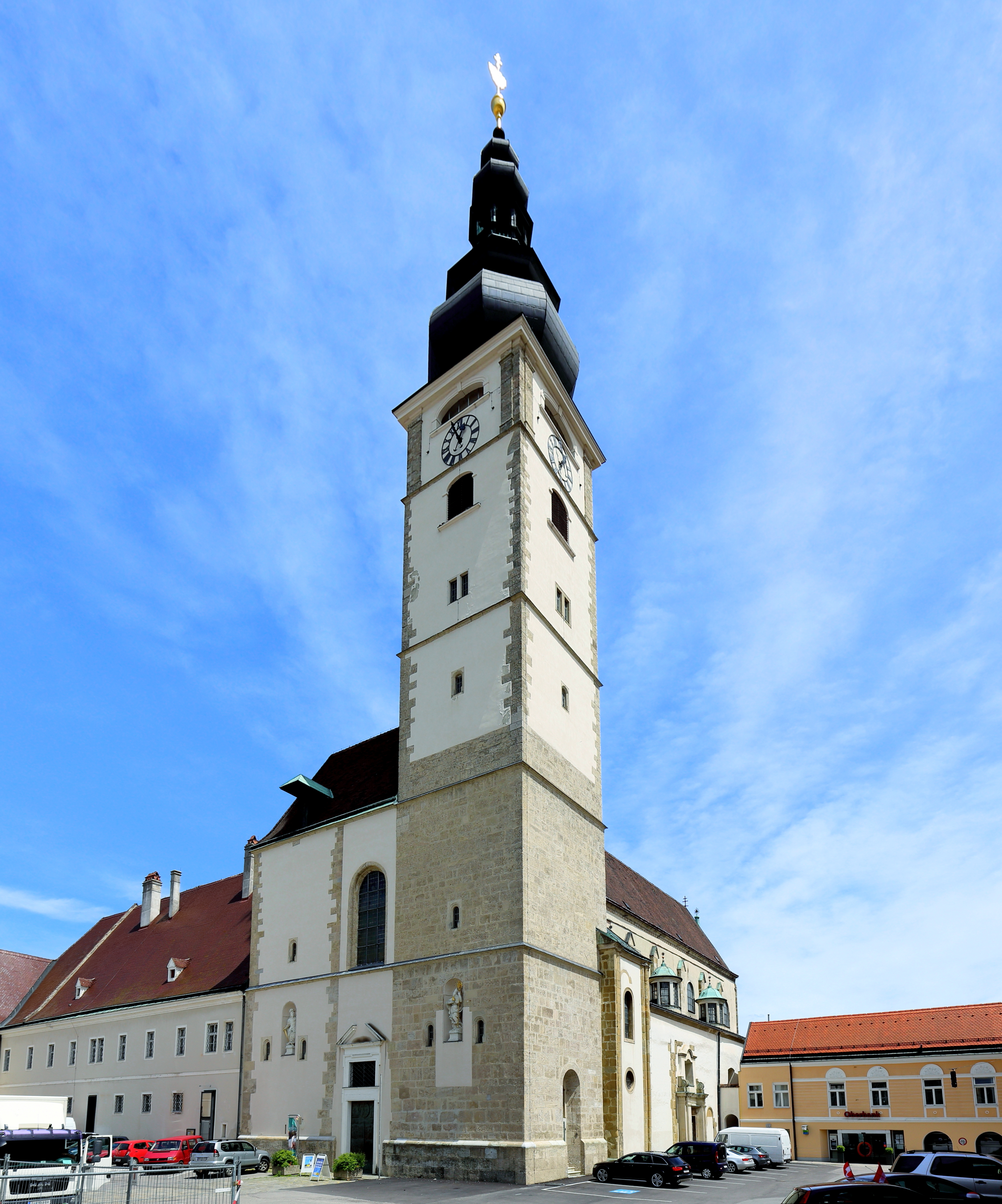 Südwestansicht des Domes Mariae Himmelfahrt in der niederösterreichischen Landeshauptstadt St. Pölten.Ursprünglich eine frühromanische, dreischiffige Basilika mit einem Weihedatum 1065. Anfang des 13. Jahrhunderts erfolgte ein umfassender Neubau. In weiterer Folge erfolgten weitere Umbauten; so wurde unter anderem der Südturm im 17. Jahrhundert umgebaut bzw. erhöht.